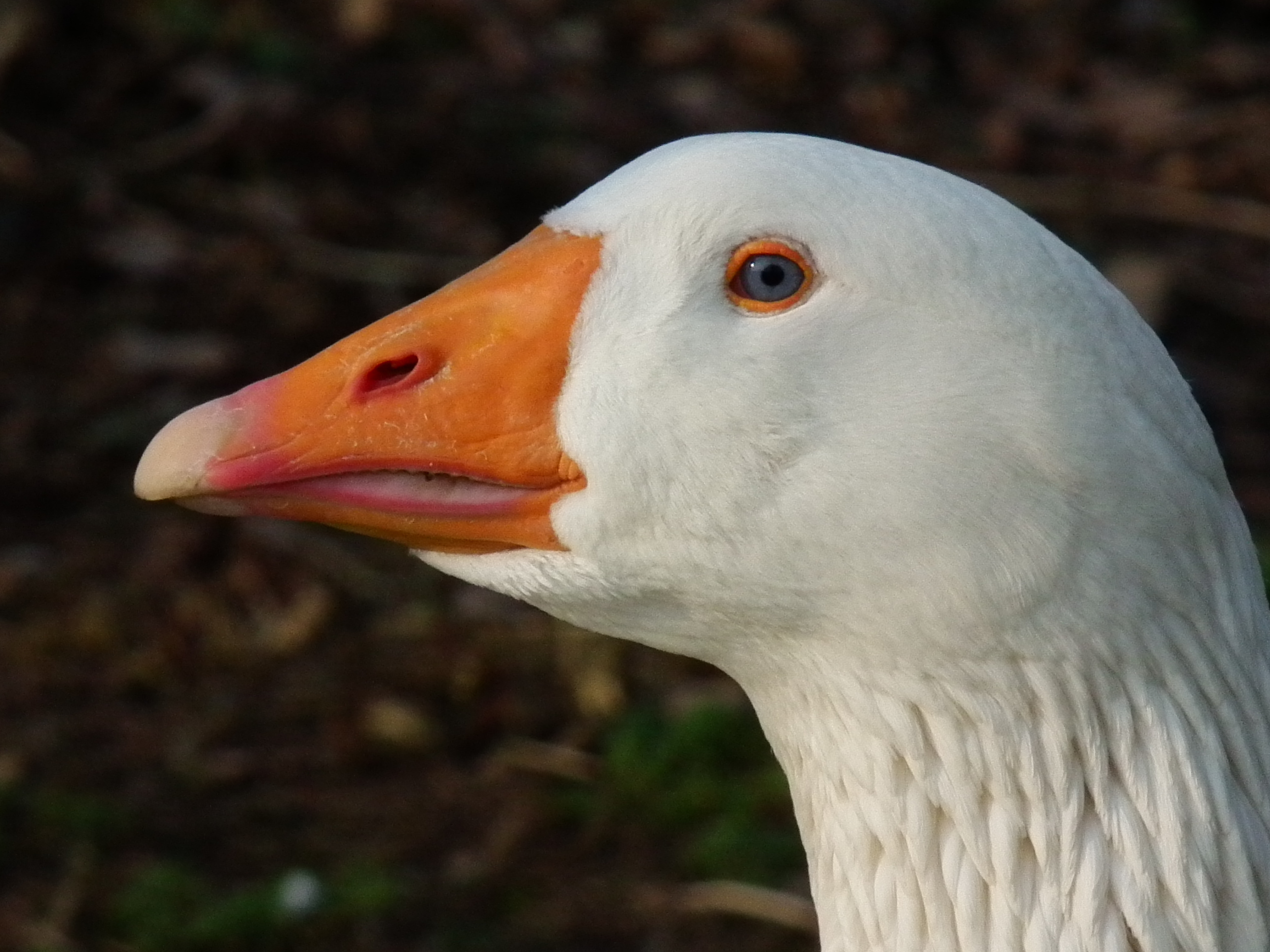 Kopf einer Pommerngans im Letzenberg Tierpark Malsch (Baden-Württemberg, Deutschland)